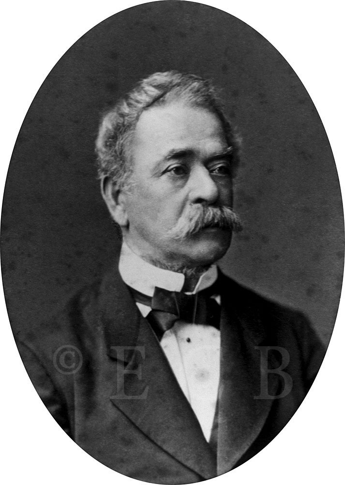 Eduard Claudi (1810 - 1884), Český politik německé národnosti.